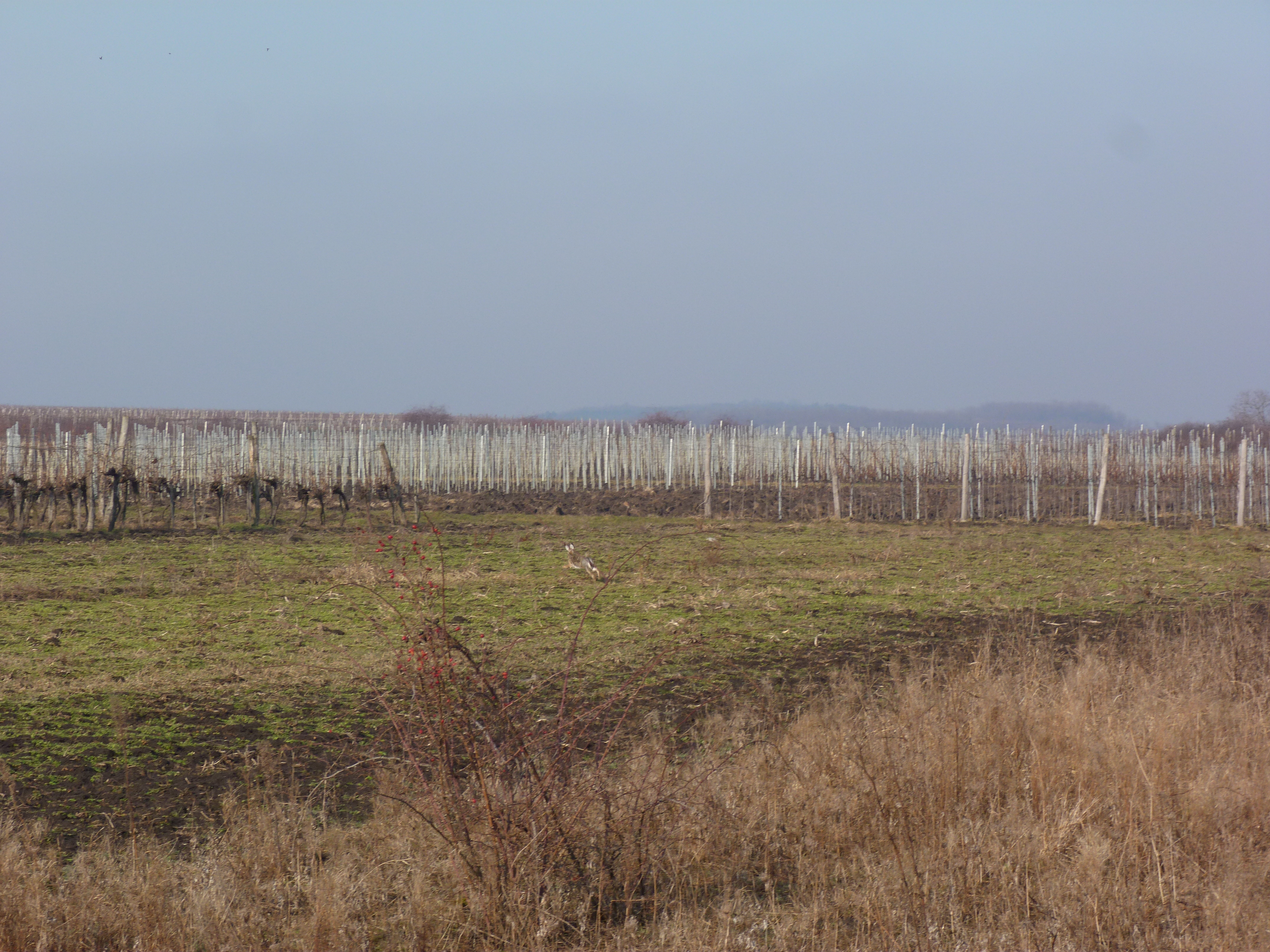 A felvétel 2015. január 14-én szerdán készült Novajon. ©© Derzsi Elekes Andor, Budapest, 2014, A kép egészben, vagy részletekben másolását, bármilyen úton történő sokszorosítását és felhasználását a szerző ellenérték nélkül, jogutódjaira is kihatóan megengedi. Az engedély kiterjed a kereskedelmi célú hasznosításra is. Kéri azonban nevének feltüntetését a felhasználás során. A Metapolisz sorozat valamennyi képe és filmje Creative Commons alatti valamint kereskedelmi - for profit - célra is felhasználható. Ajánlott hivatkozás: Derzsi Elekes Andor: Metapolisz DVD line